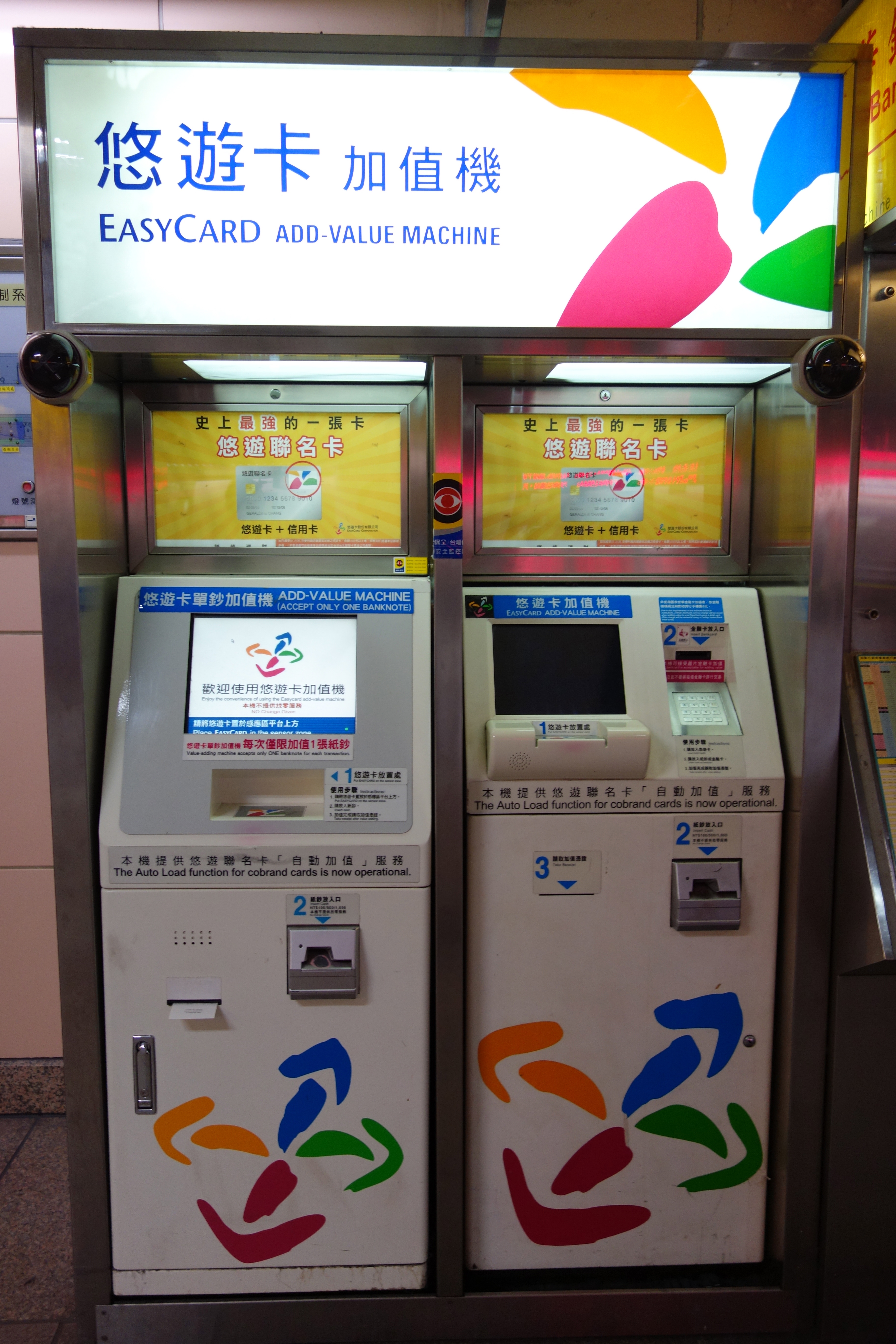 台北捷運台北車站悠遊卡加值機。